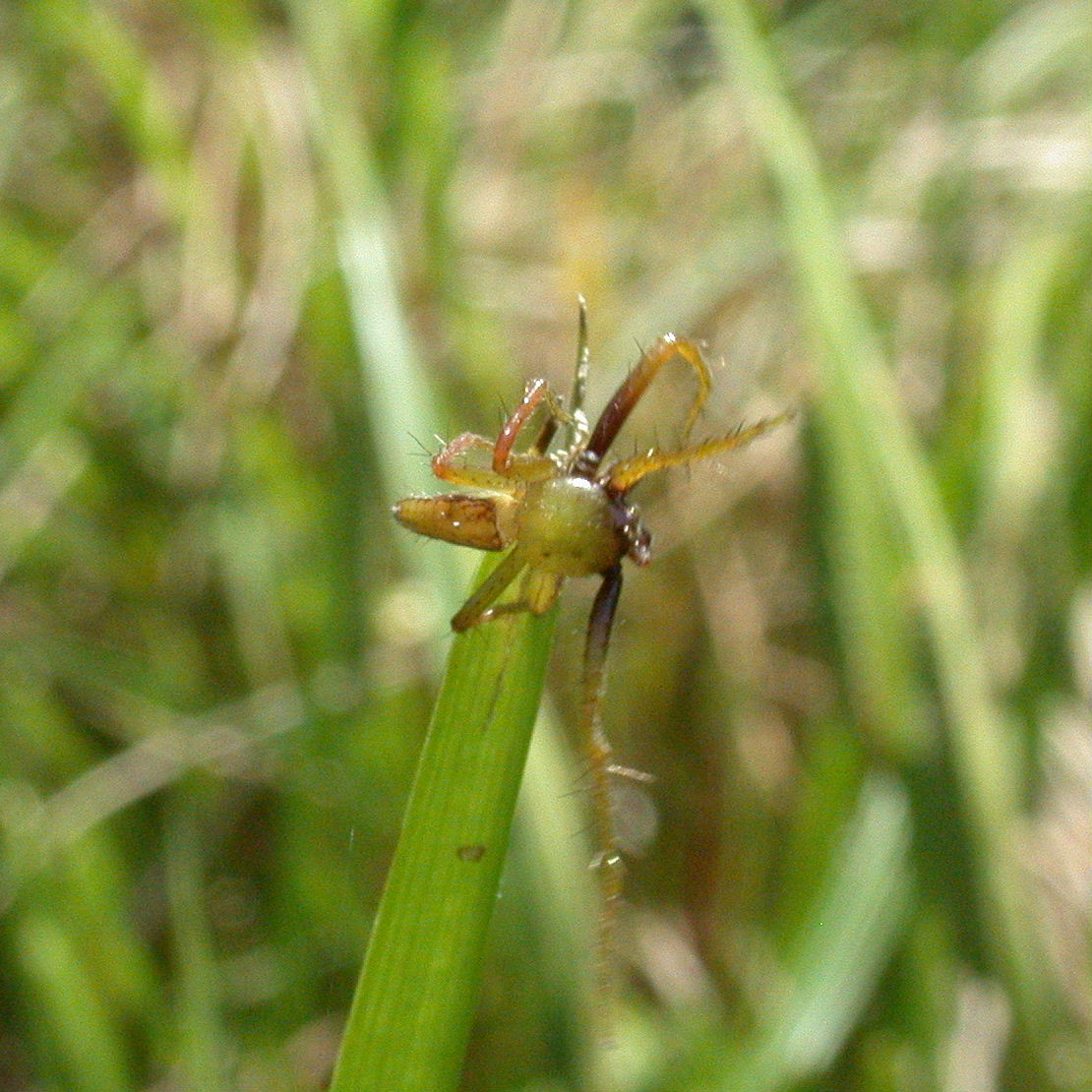 2002/05/26 和歌山県田辺市：Tanabe City. Wakayama Pref. Japan